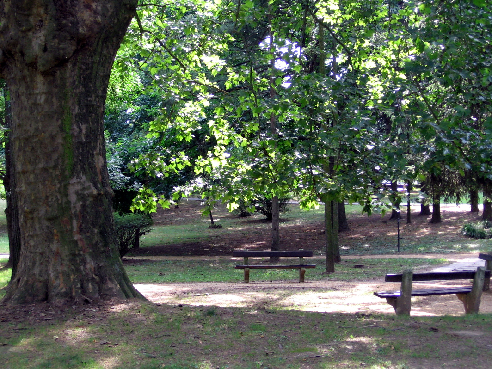 Széchenyi park